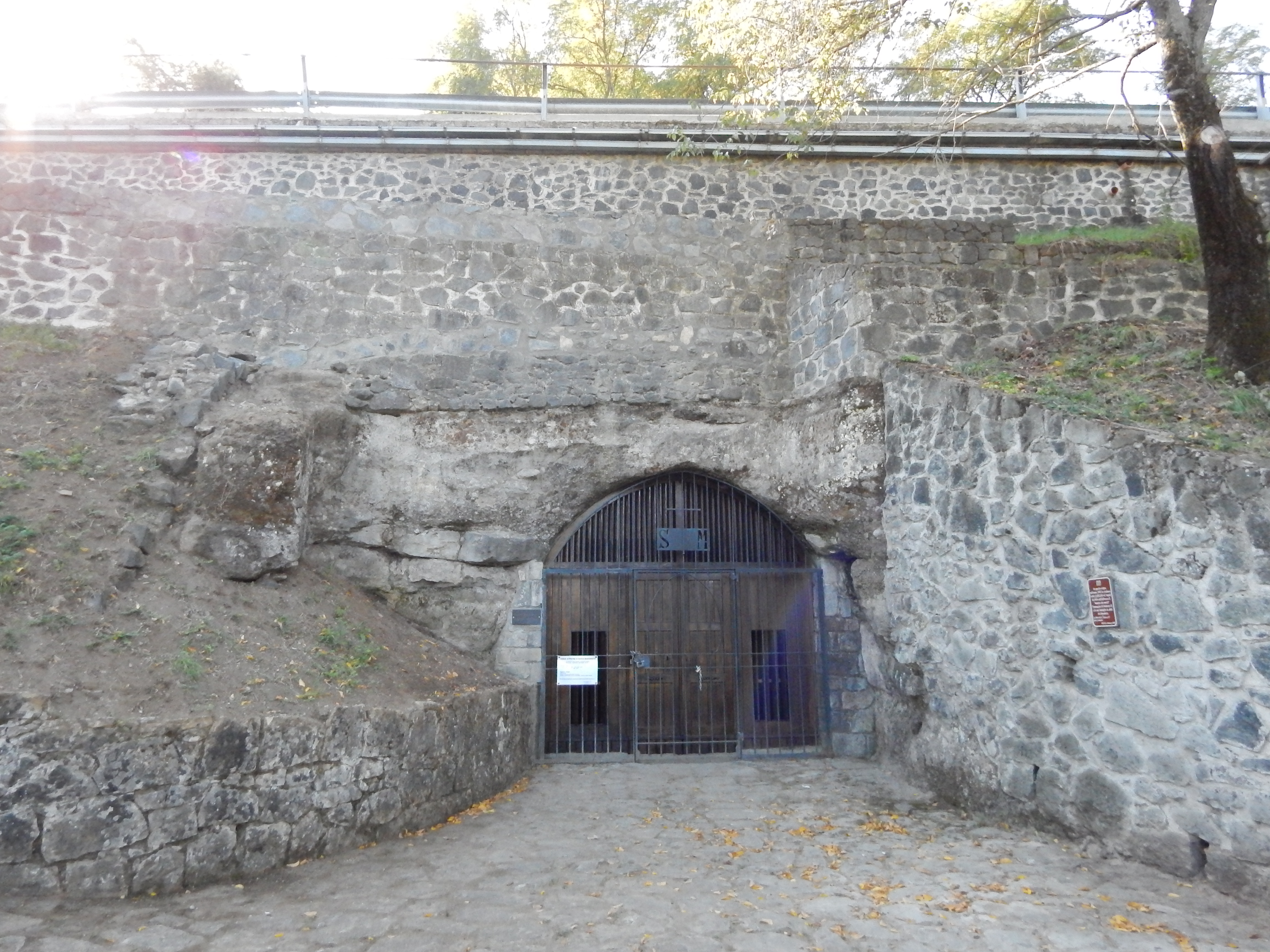 Esterno chiesa di Santa Margherita, Melfi.